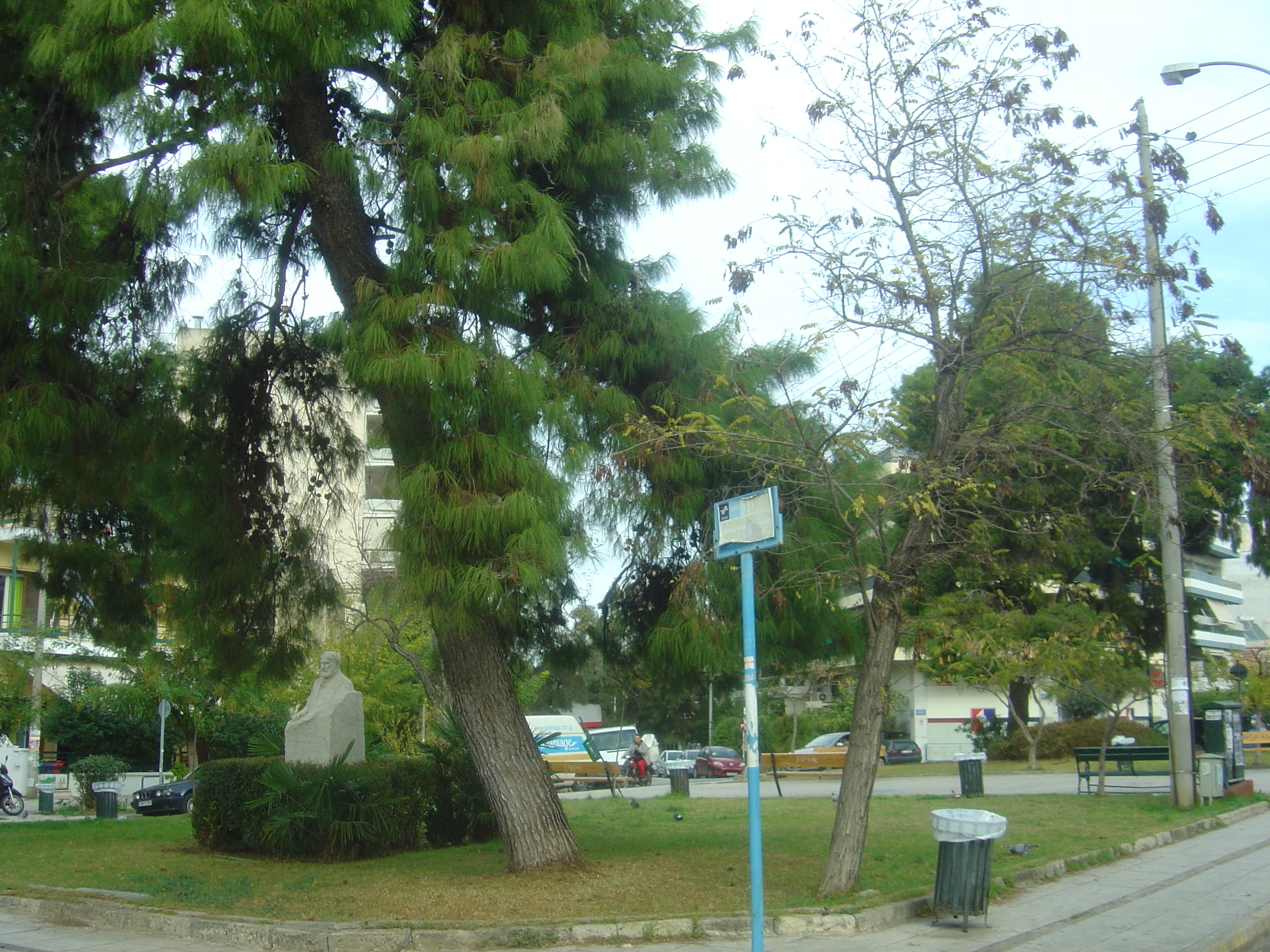 Κυπριάδου: Πλατεία Παπαλουκά, όπου ζούσε ο ζωγράφος Σπύρος Παπαλουκάς (Spyros Papaloukas, 1892 - 1957). Φωτό 2010